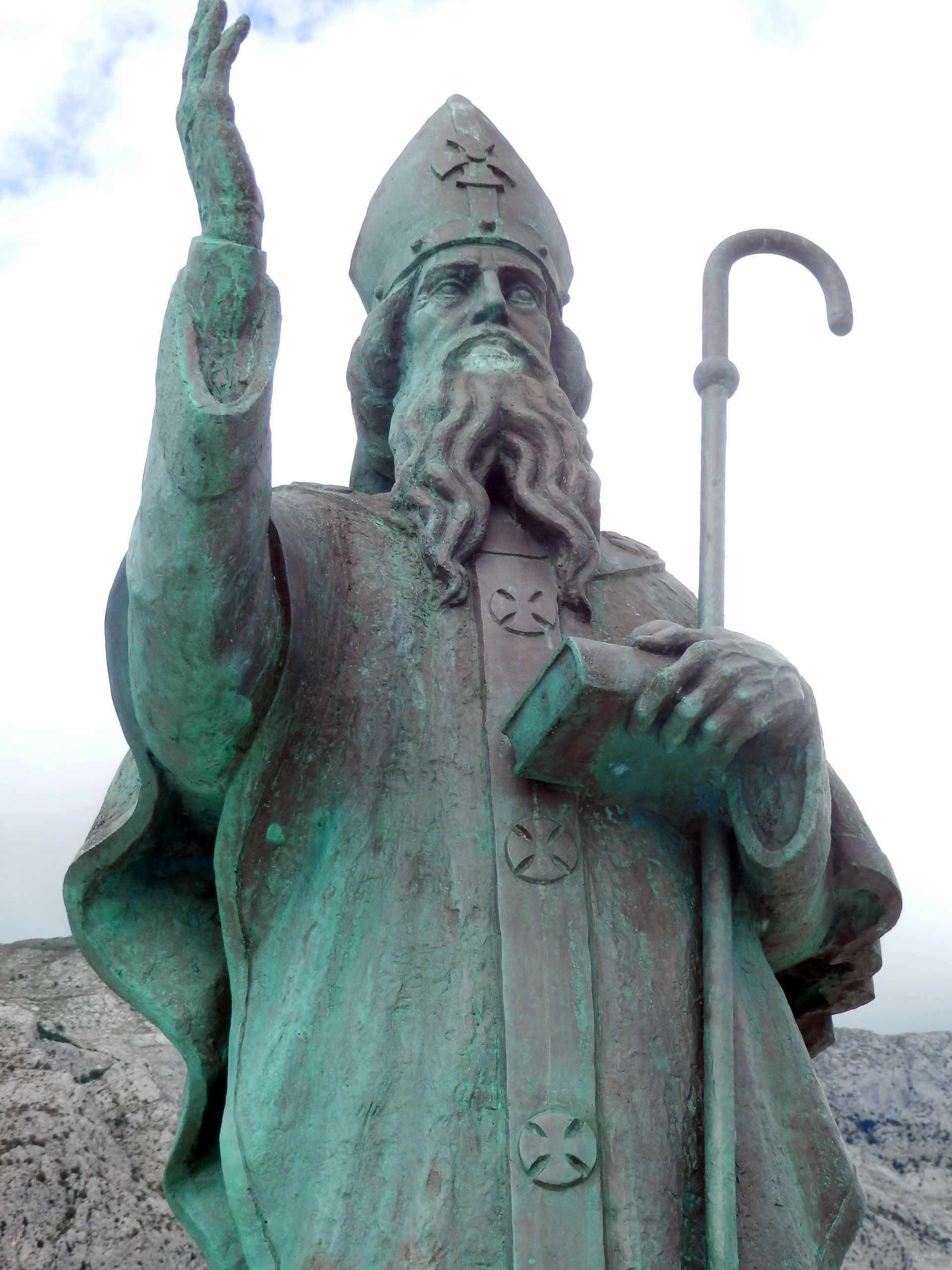 Socha svätého Mikuláša. Prímorské letovisko Baška Voda v Strednej Dalmácii pri Jadranskom mori. Chorvátsko, leto 2016.